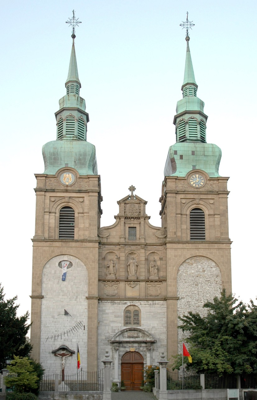 St.-Nikolauskirche, Eupen. Architect: Laurenz Mefferdatis (* 1677; † 1748)